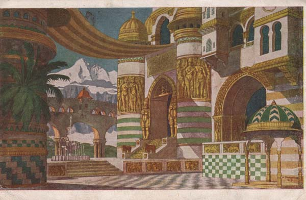 Билибин И. Дворец Черномора. изд. Изд. Община Св.Евгении